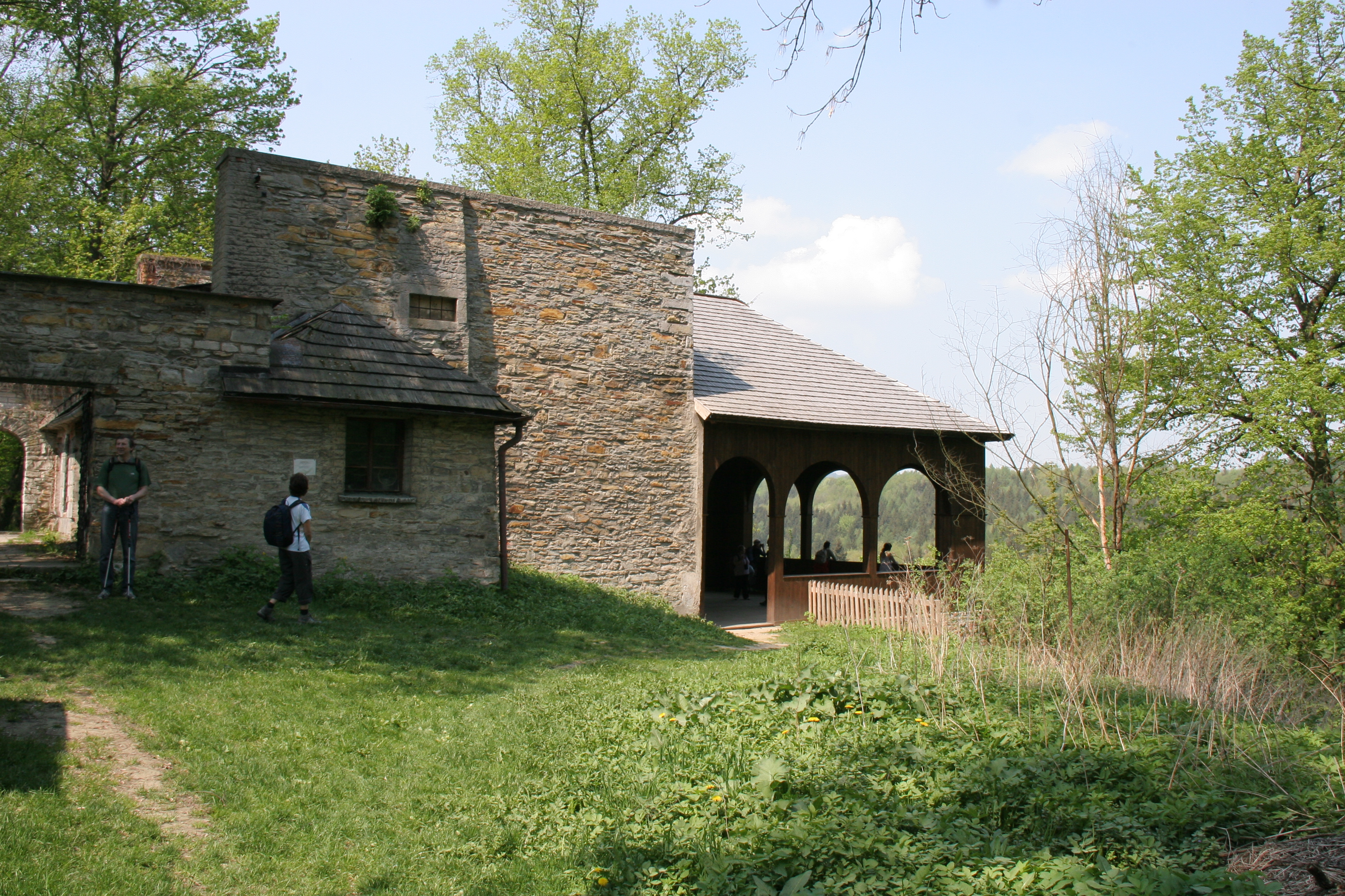 Hrad Rýzmburk, zřícenina (Rýzmburk), Rýzmburk